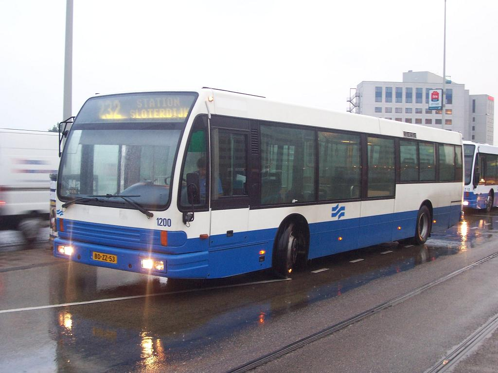 GVB 1200, ex Midnet 1200, Amsterdam Sloterdijk.